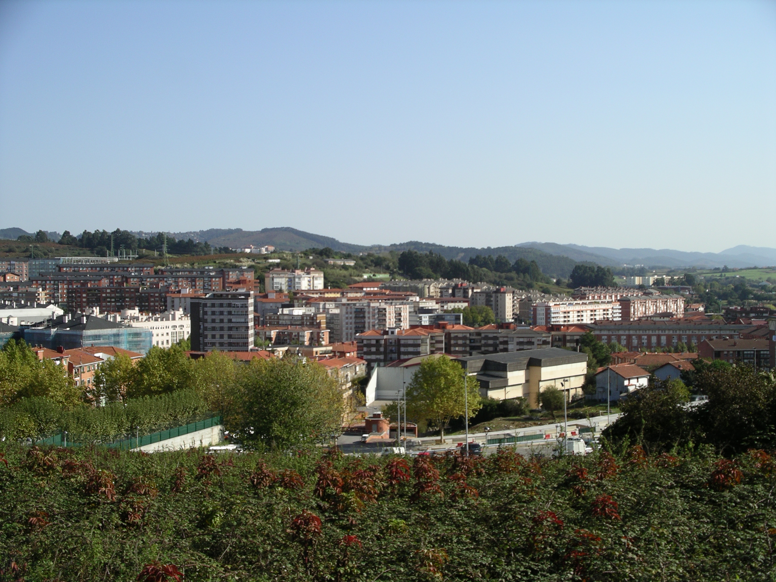 Leioa, Bizkaia.